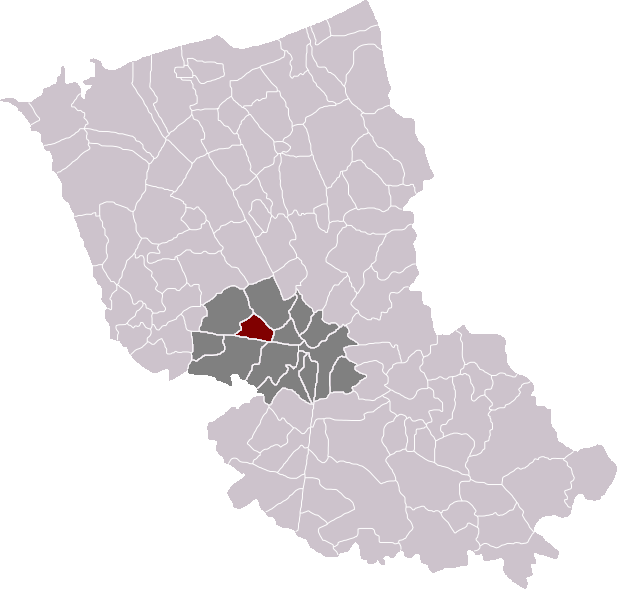 Locatie gemeente Ochtezele in arrondissement Duinkerke. Zelfgemaakt. Location of Ochtezeele municipality in the arrondissement of Dunkirk. Self made. Localisation de la commune d'Ochtezeele dans l'arrondissement de Dunkerque. Fait moi-même.